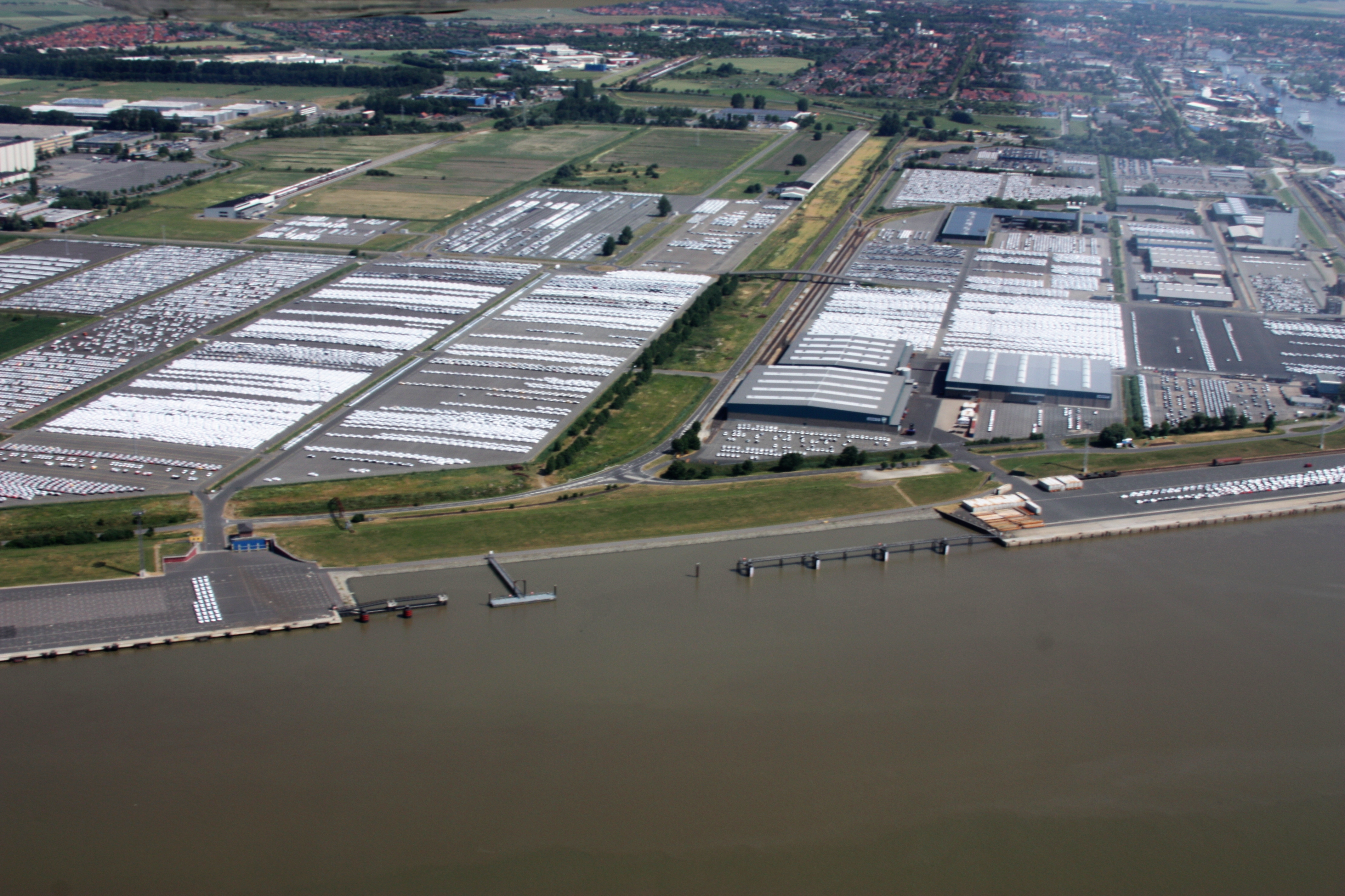 Flug über Emden; Flughöhe 1500 ft; Juli 2010; Originalfoto bearbeitet: Tonwertkorrektur und Bild geschärft mit Hochpassfilter